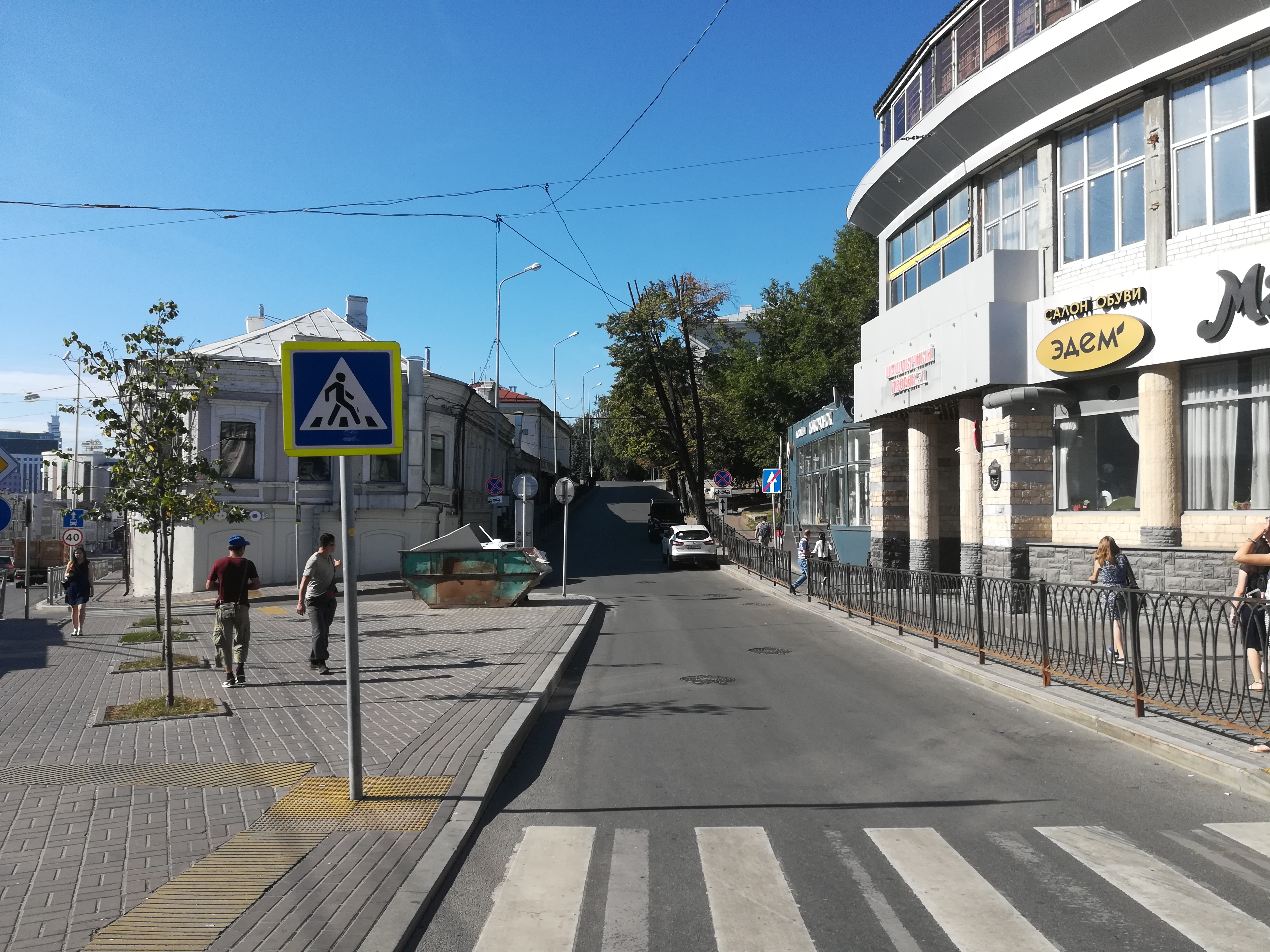 Улица Нужна в Казани